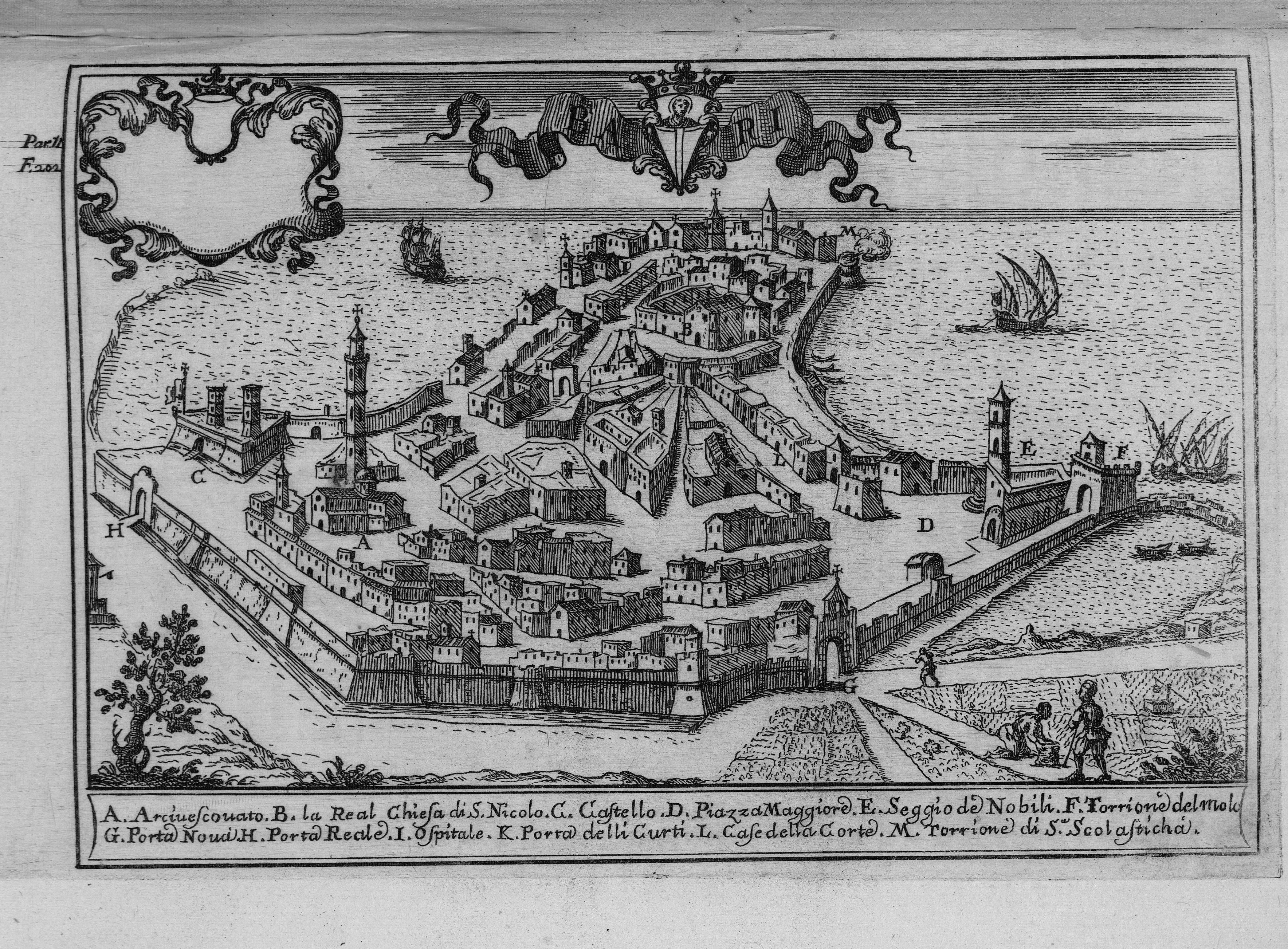 Autor: Pacichelli, Giovanni Battista, 1641-1702 Descripción bibliográfica: Il regno di Napoli in prospettiva : diviso in dodeci provincie, in cui si descrivono la sua Metropoli Fidelissima città di Napoli ... Opera postuma divisa in tre parti / dell'abatte Gio. Battista Pacichelli ; Parte prima [-terza] ... Del regno di Napoli in prospettiva / dell'abate Pacichelli. Parte prima. - In Napoli : nella Stamperia di Michele Luigi Mutio, 1703. - v. : principalmente il.; 4º . - Inic. adorn. y frisos dec. - Grab. calc. y h. pleg. grab. calc. de mapas de Cassianus de Silva. Ilustrador: Cassiano De Silva, Francesco, il. Impresor: Muzio, Michele Luigi, imp. Lugar de impresión: Italia. Nápoles Localización: Vea la ilustración en su contexto